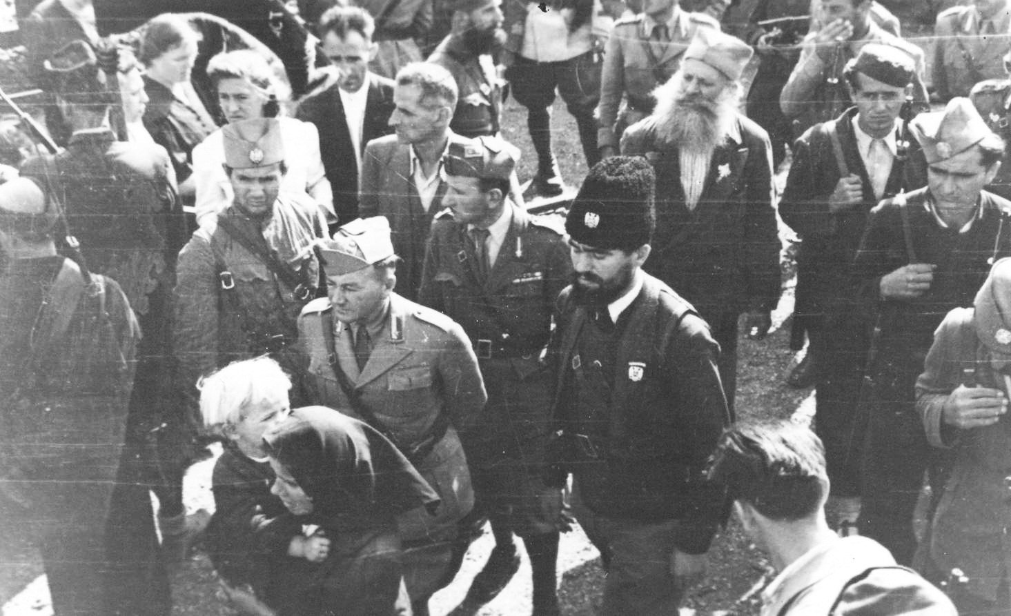 Srpskohrvatski / српскохрватски: Četnički vođa pop Đujić sa svojim četnicima i Italijanima 1942-43.